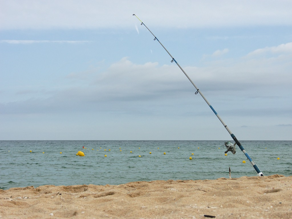 Descripción: Caña de pesca en playa Fecha: 09/07/2005 Hora: 17:38 Cámara: DiMAGE A2 ISO: 64 Tv: 1/1000 Av: 4 Autor: aTarom